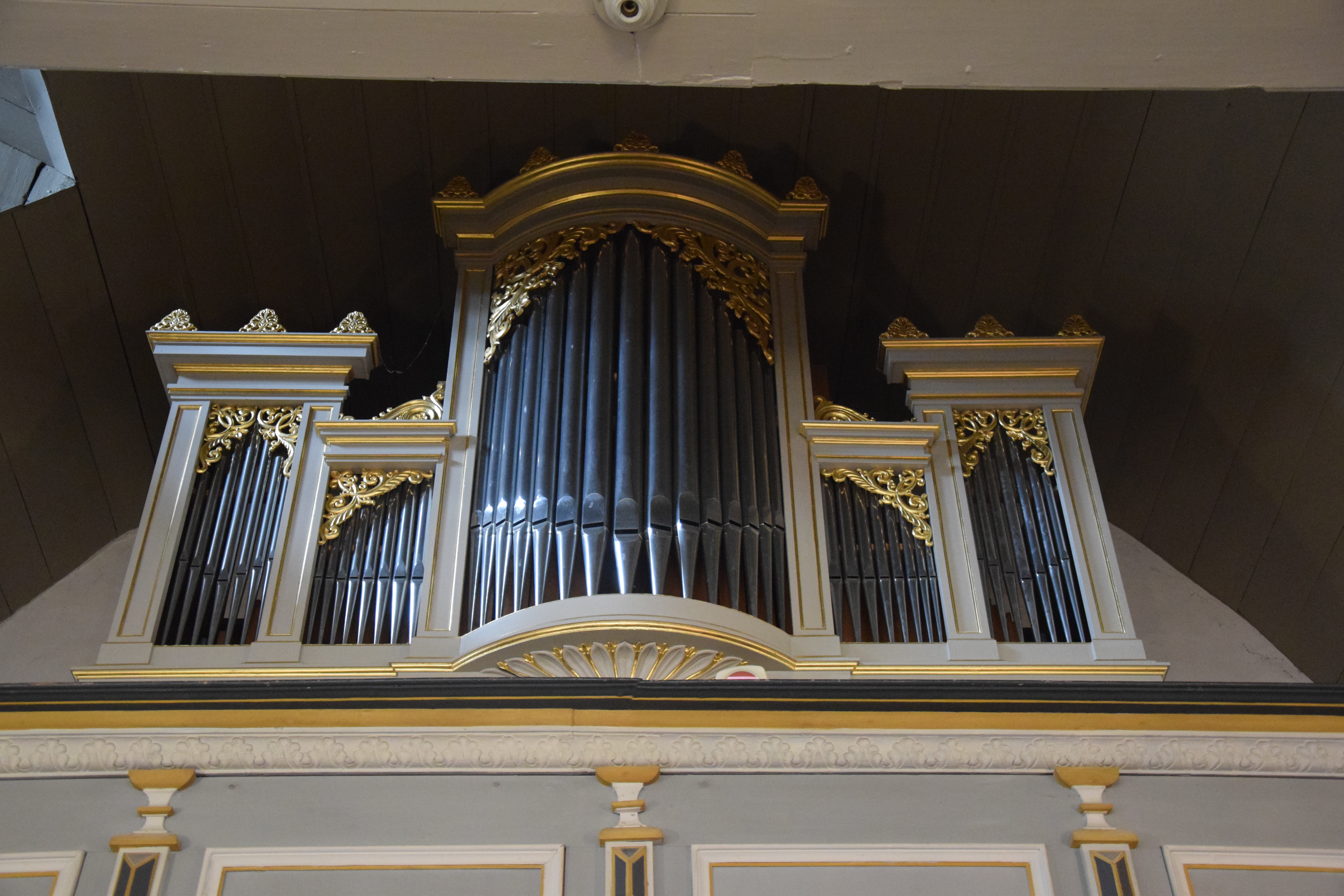 Prospekt der Engelhardt-Orgel in der St. Marien-Kirche Wollershausen